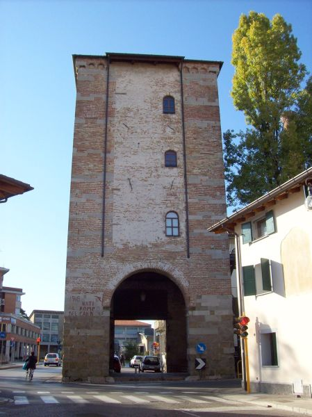 Udine (Friuli Venezia Giulia - Italy), Porta Villalta